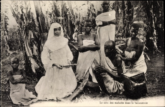 Soin des malades dans la bananeraie par une missionnaire de Notre-Dame d'Afrique. Années 1930.